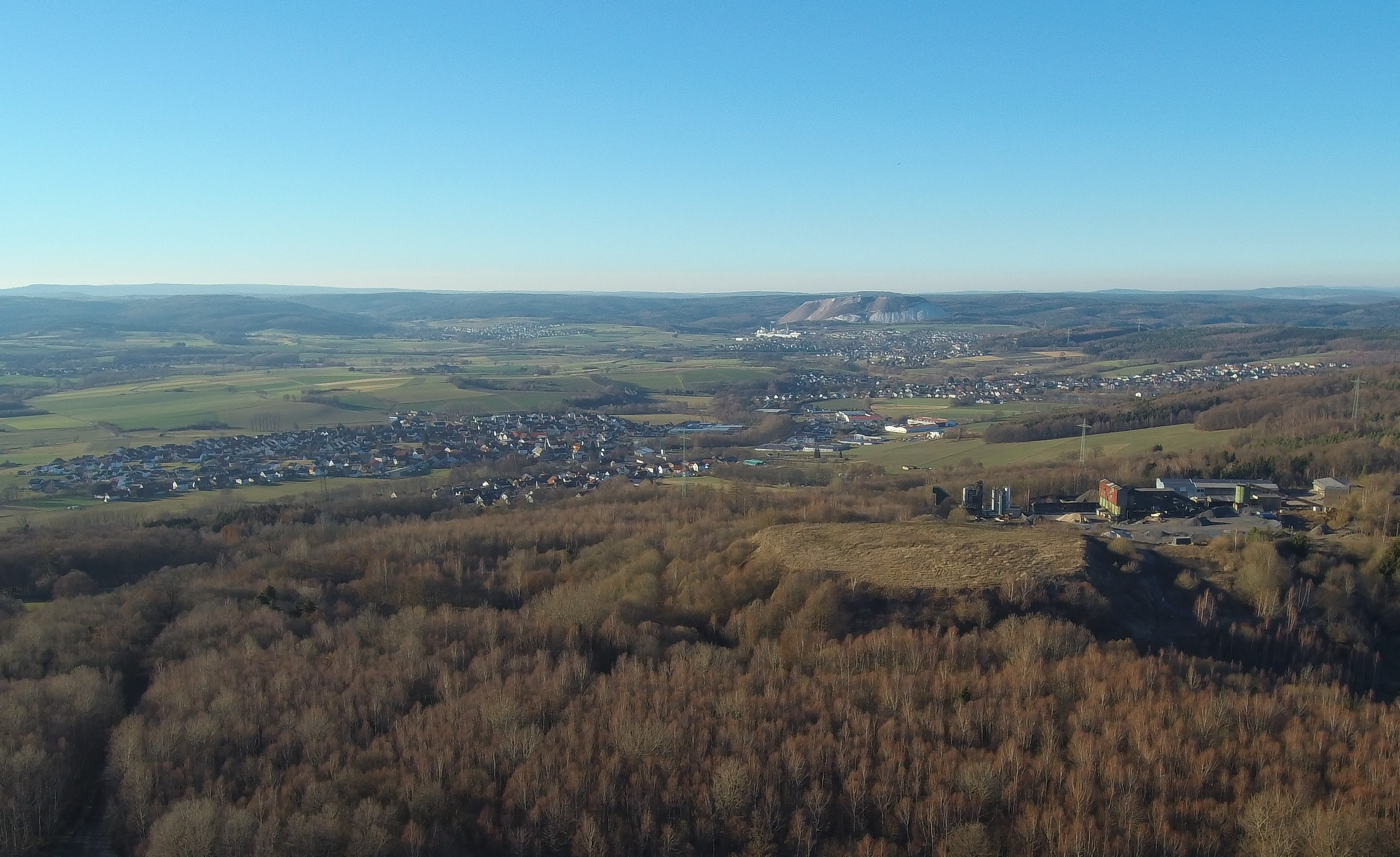 Blick über das Kalbachtal Richtung Kaliberg Neuhof